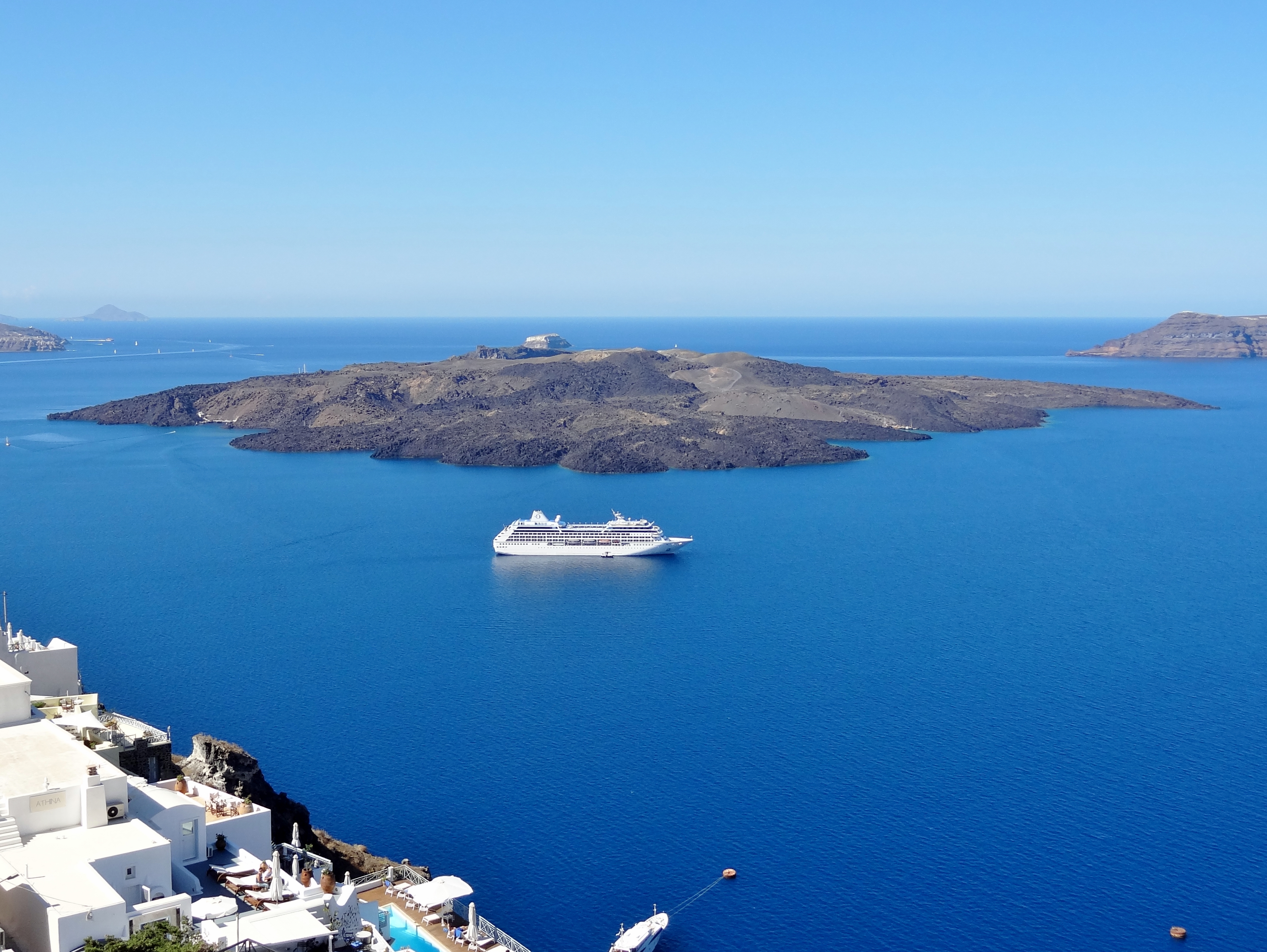 Fira an der Caldera von Santorin, Kykladen, Griechenland